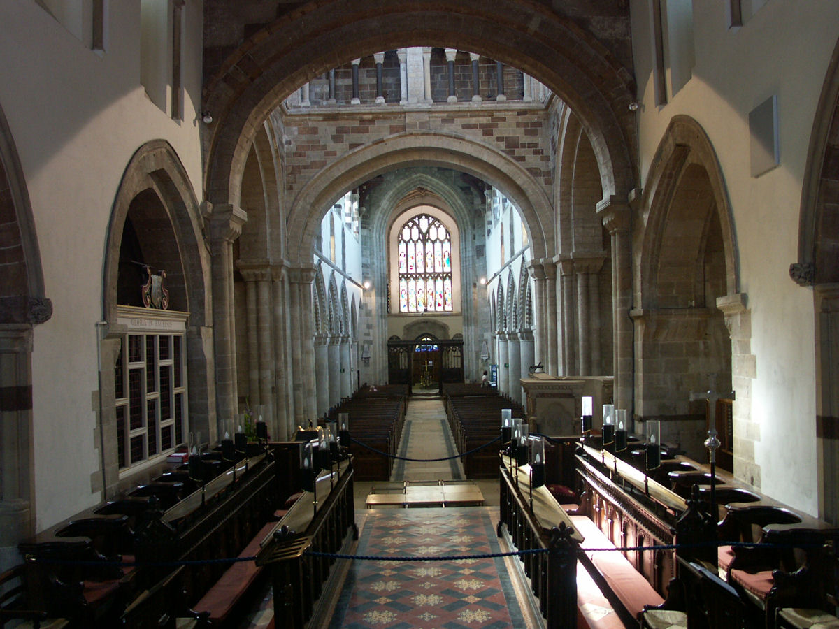 Wimborne Minster, Wimborne Minster, England